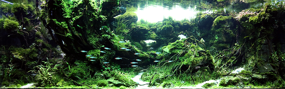 IIAC2018 6위, IAPLC2018 57위